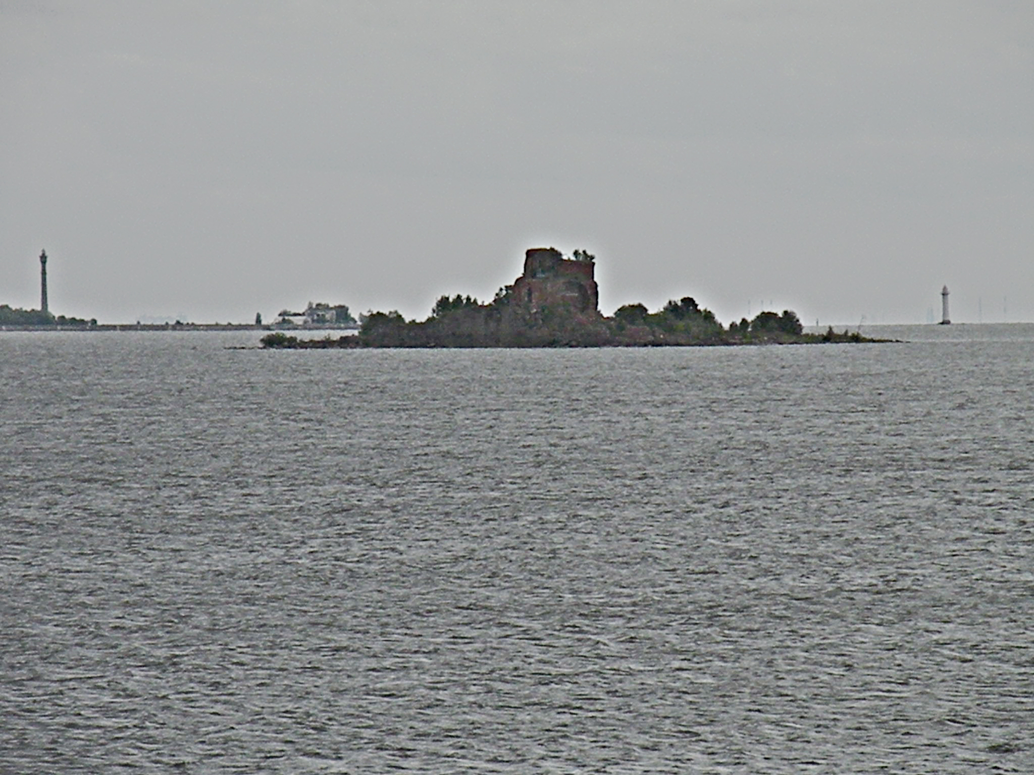 Fort_Nr._4._Kronstadt.